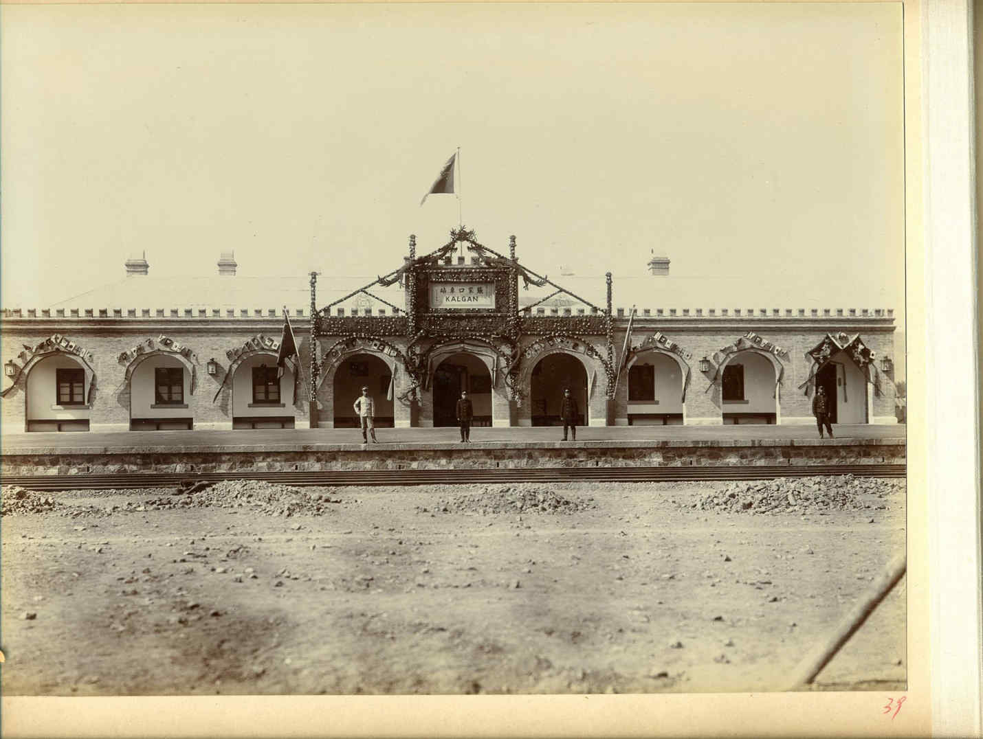 京张铁路通车典礼之张家口车站